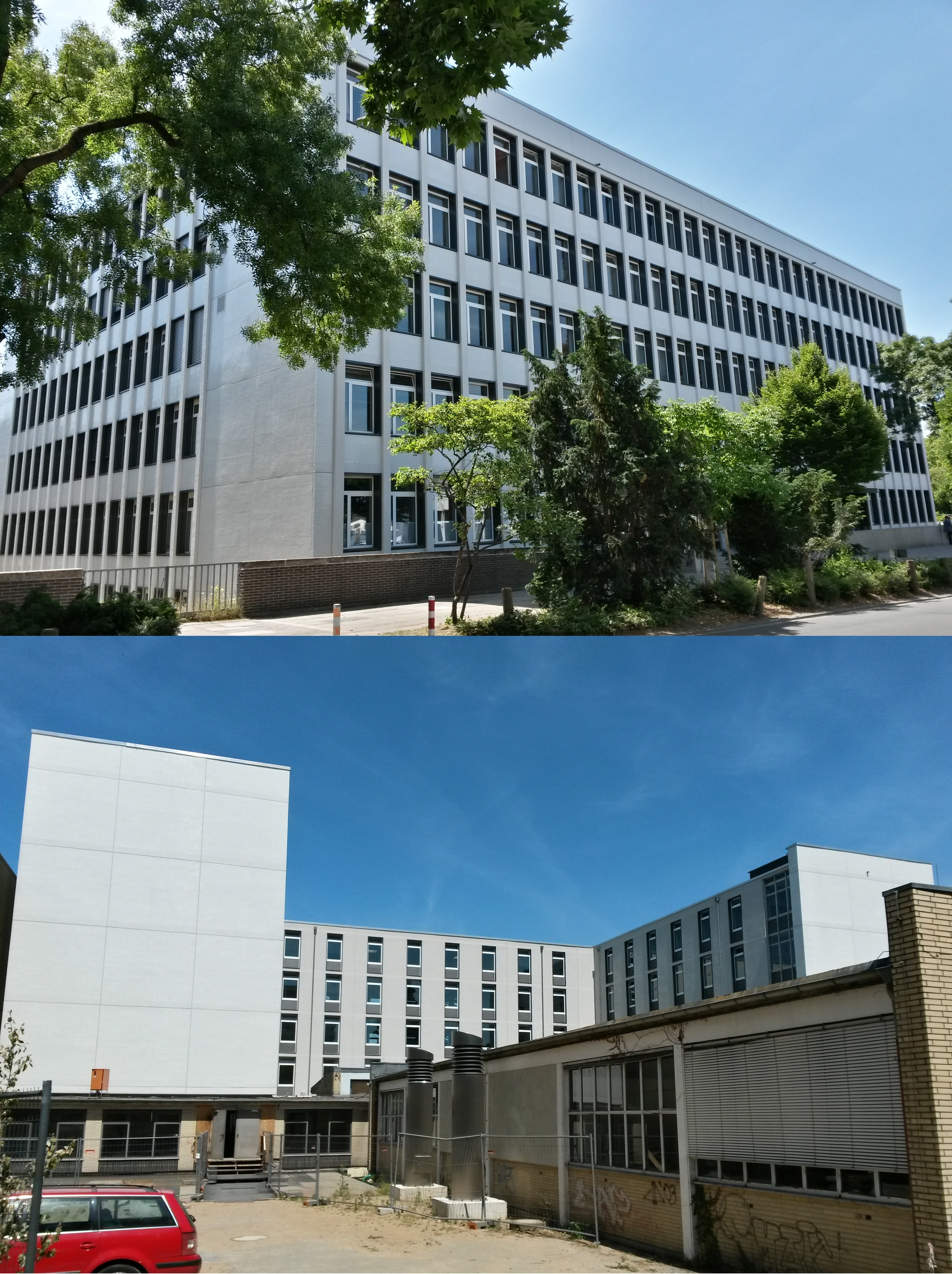 Peter-Behrens-Schule in Darmstadt, Mornewegstraße 18; in den frühen 1960er Jahren erbaut; Oben: Ansicht von Norden, Unten: Ansicht von Süden.